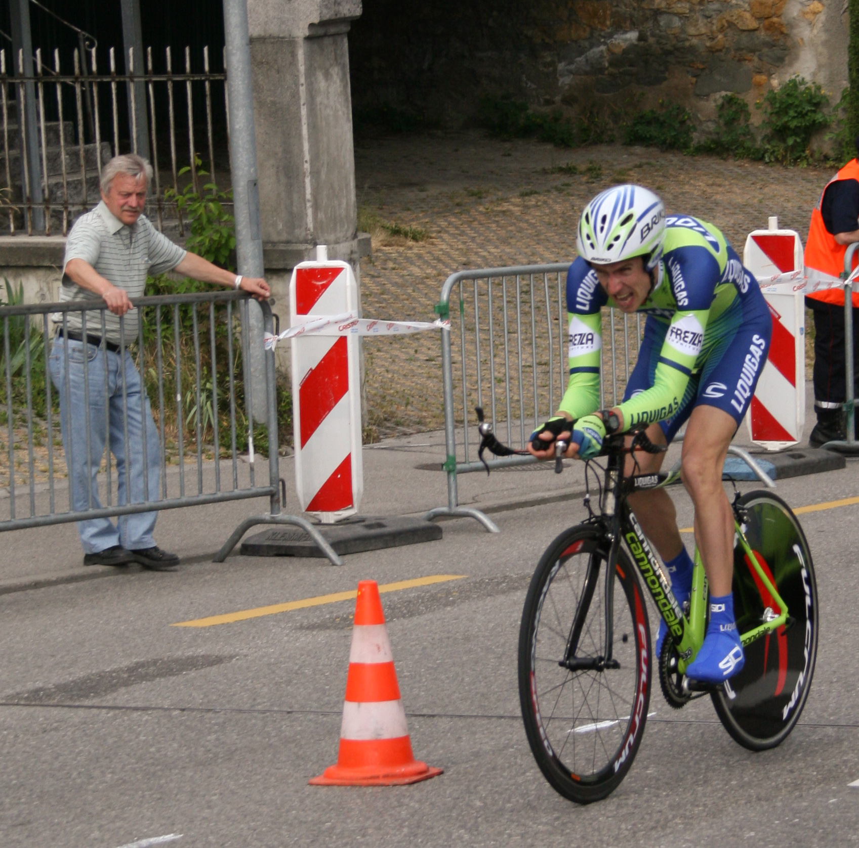 Charles Wegelius prologue du Tour de Romandie 2007